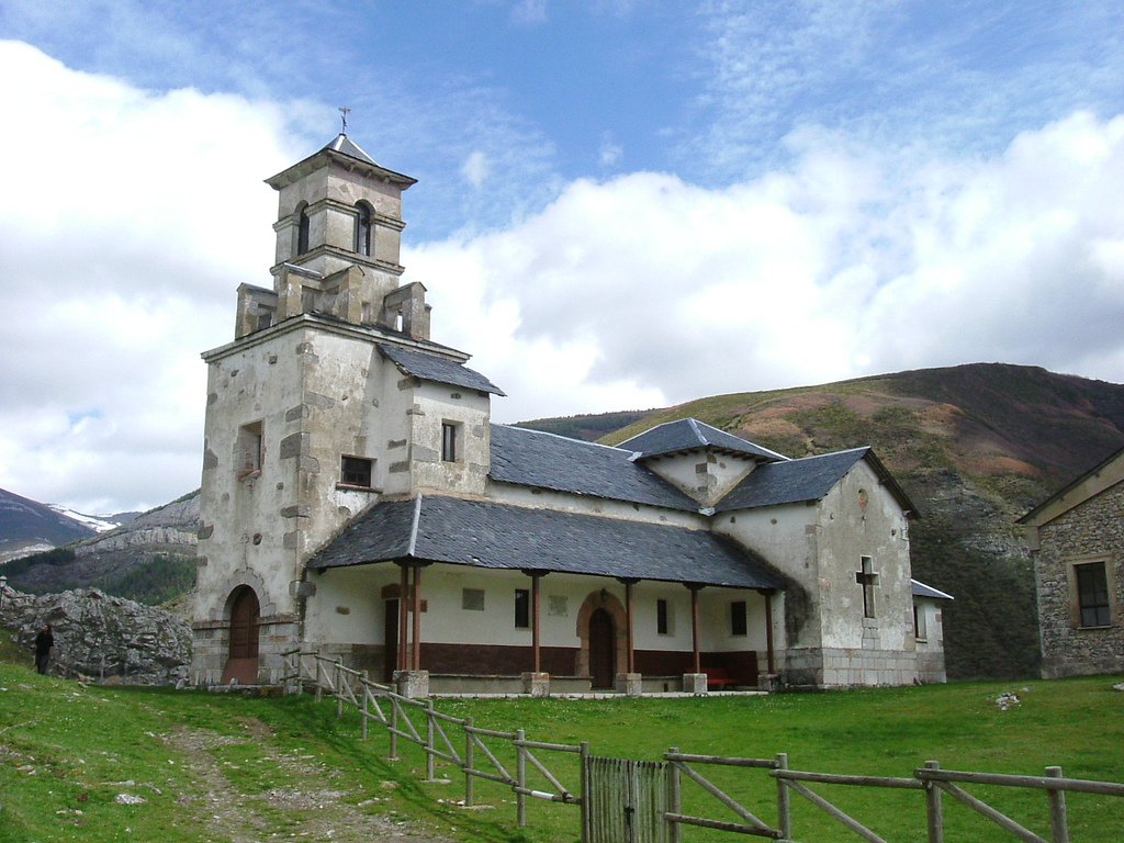 Iglesia de Lugueros, cabeza del municipio de Valdelugueros.